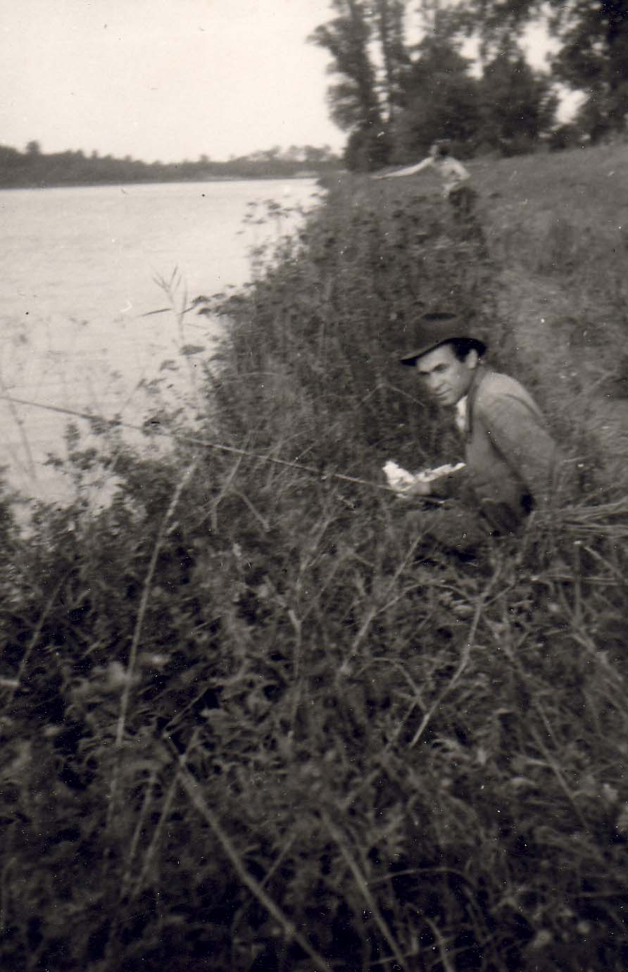 Alois Šiška rybařící u Dušník